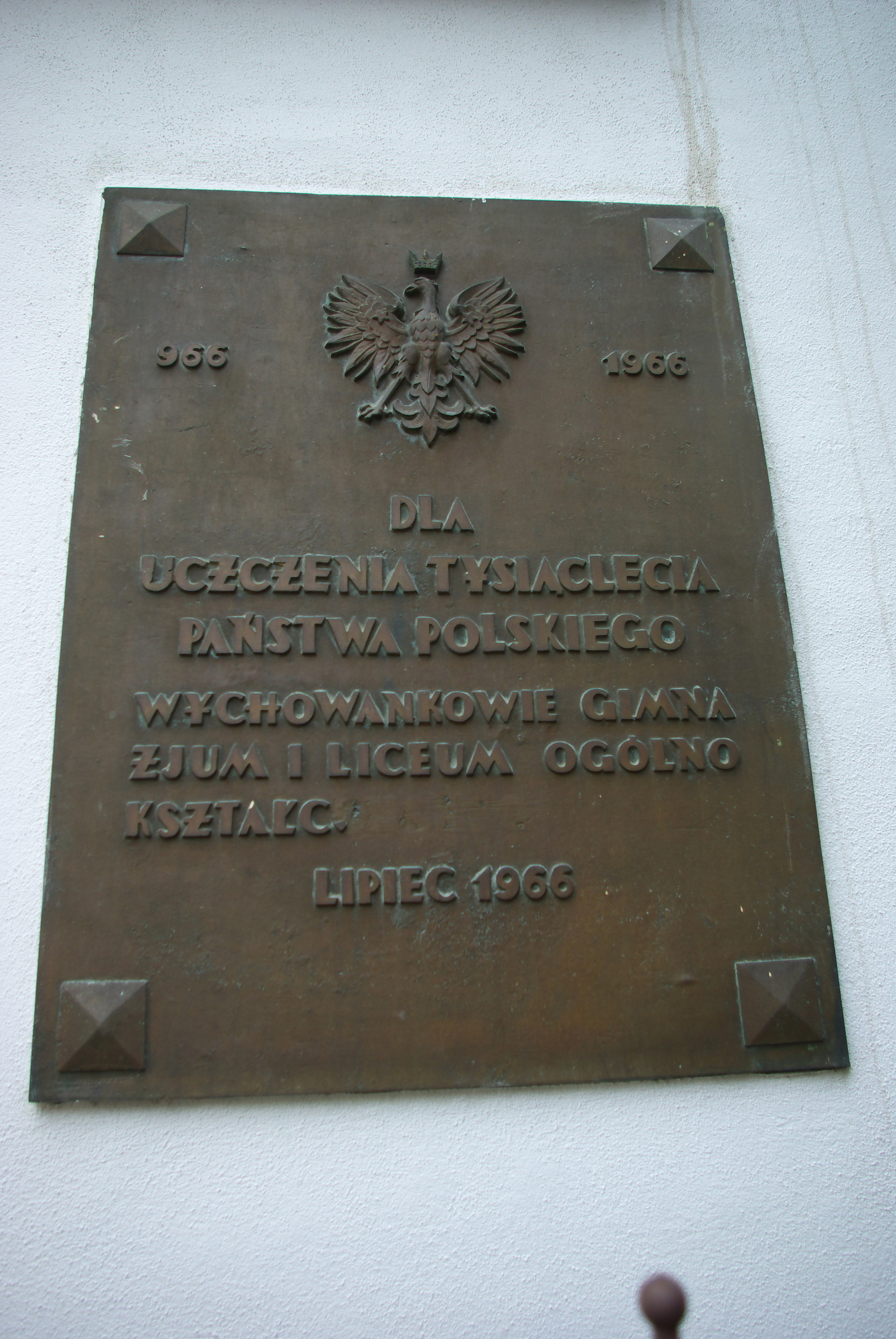 I Liceum Ogólnokształcące im. Króla Kazimierza Wielkiego w Brzozowie. Tablica 1000-lecia Polski 966-1966